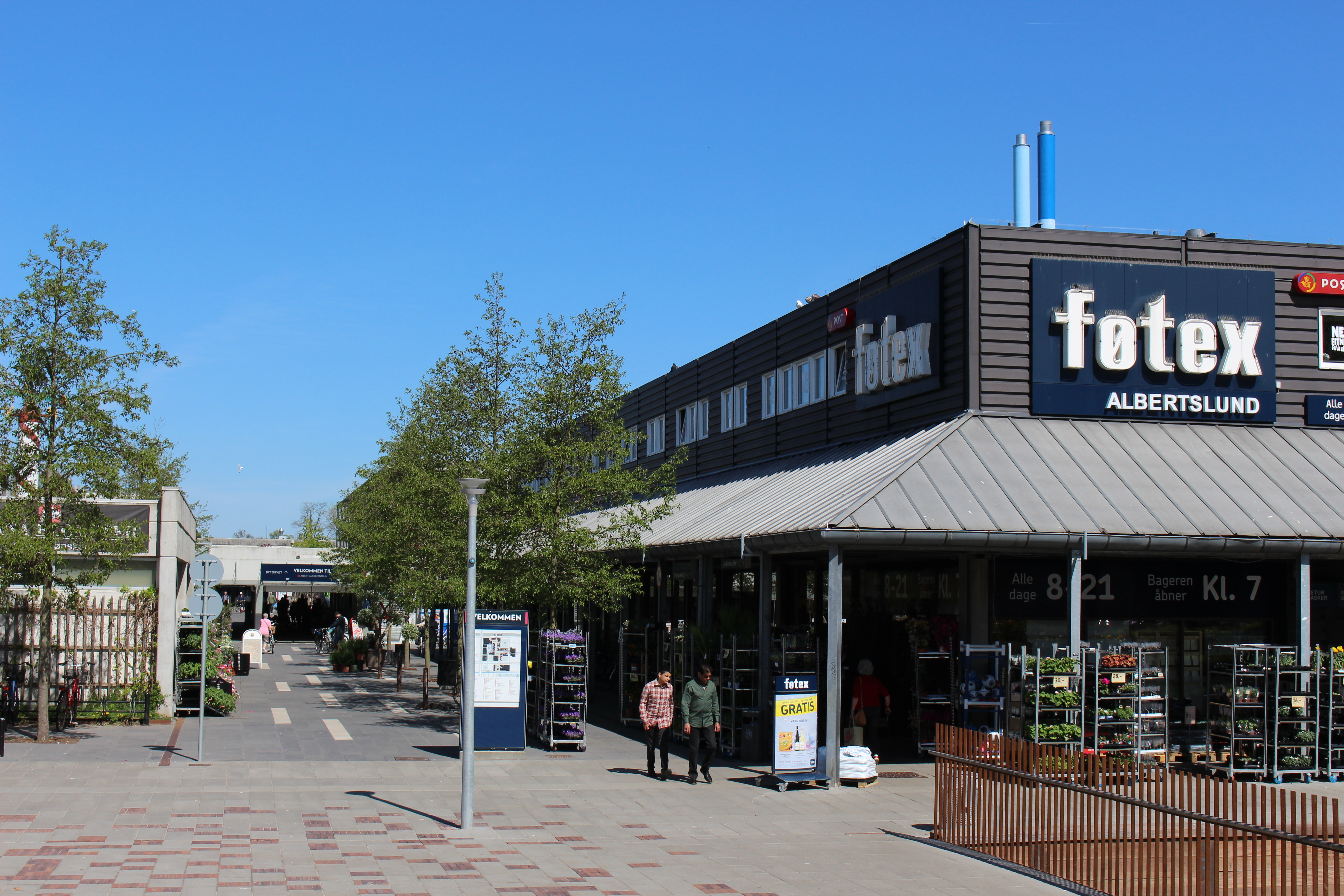 Albertslund Centrum ved Føtex